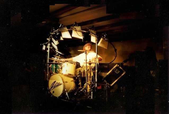 Drummer van Vitesse